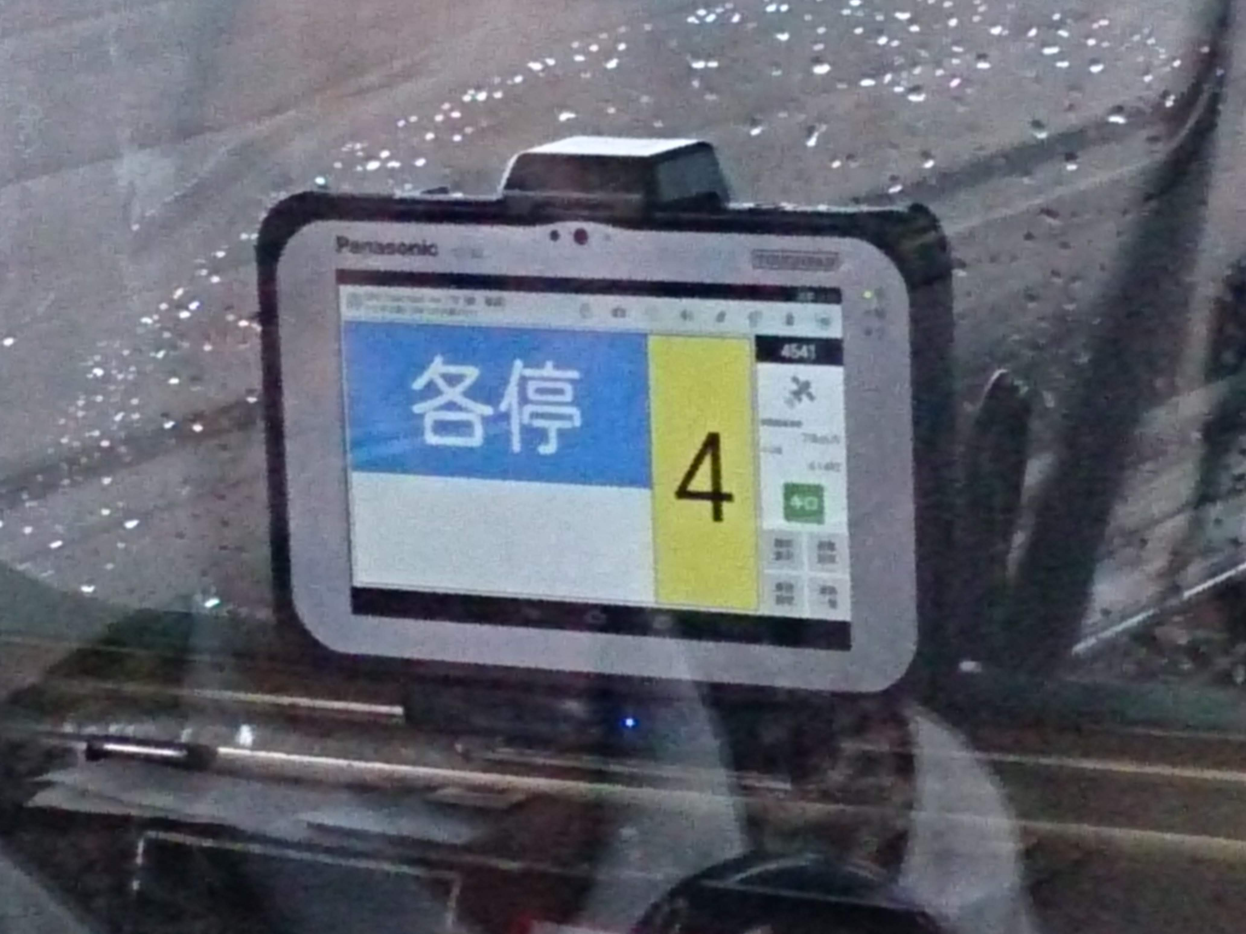 近鉄電車に搭載されているパナソニック製タブレット